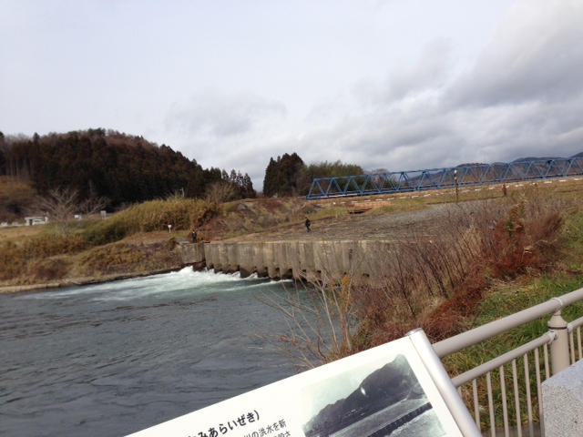 北上川鴇波洗堰